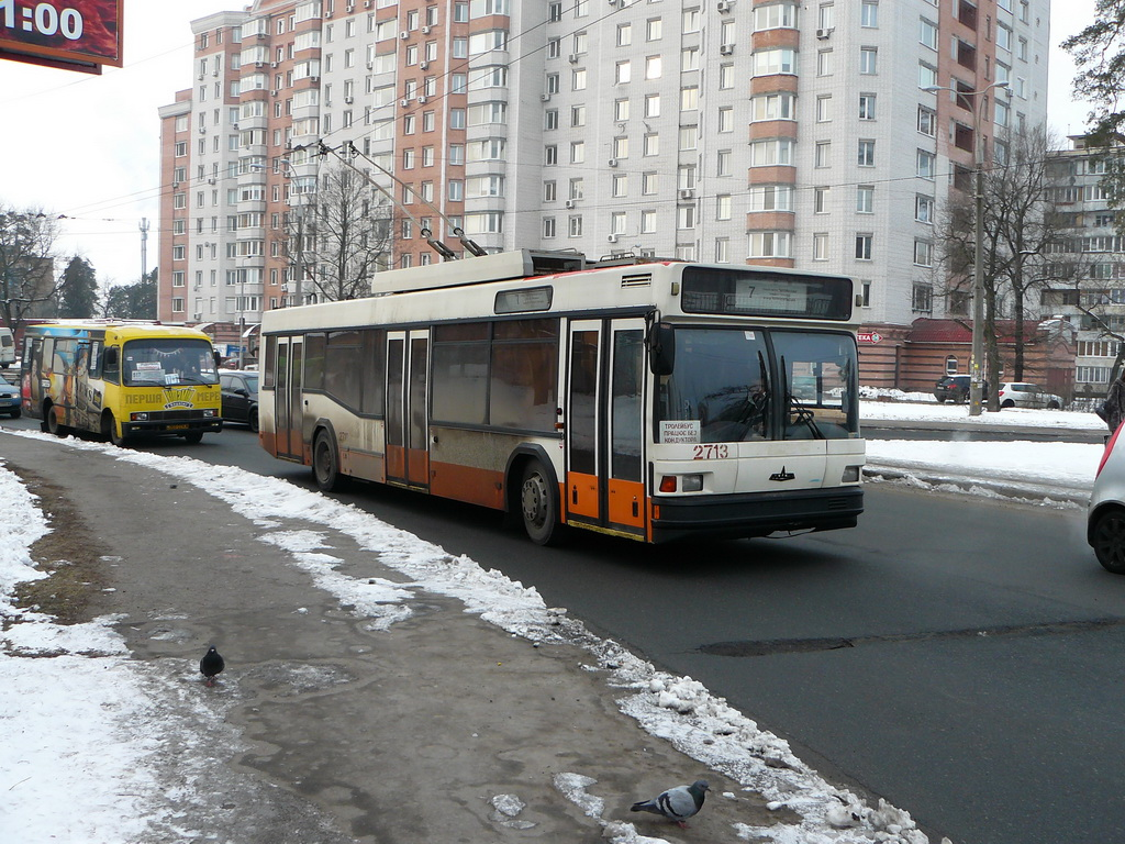 Троллейбус МАЗ-103Т № 2713 7-го маршрута на проспекте Победы в Киеве.